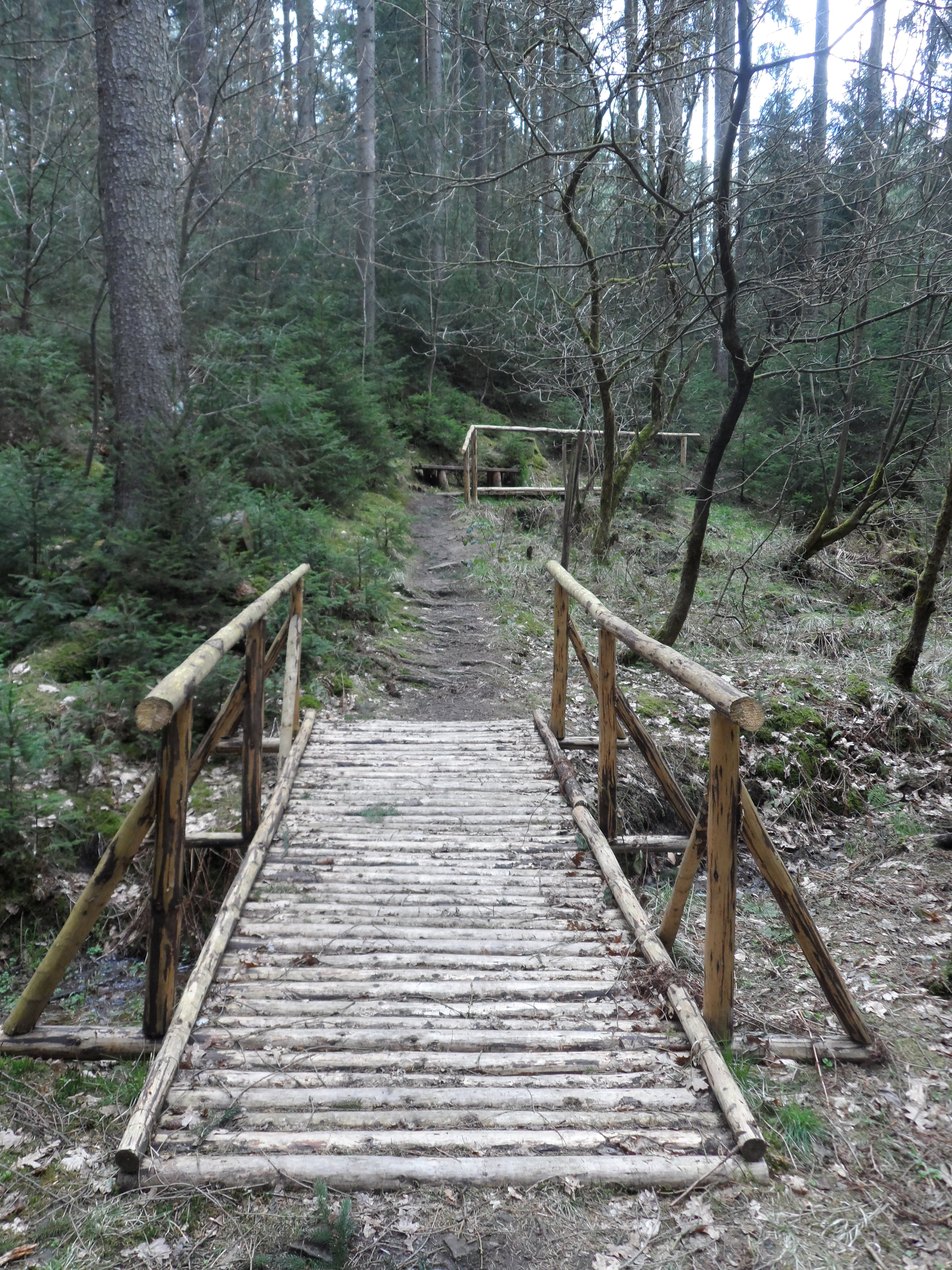 Einer der Abschnitte des Lehrer-Bocklisch-Weges (Naturlehrpfad) nahe dem Läusegrund und der Läusegrundquelle im Zeitzgrund